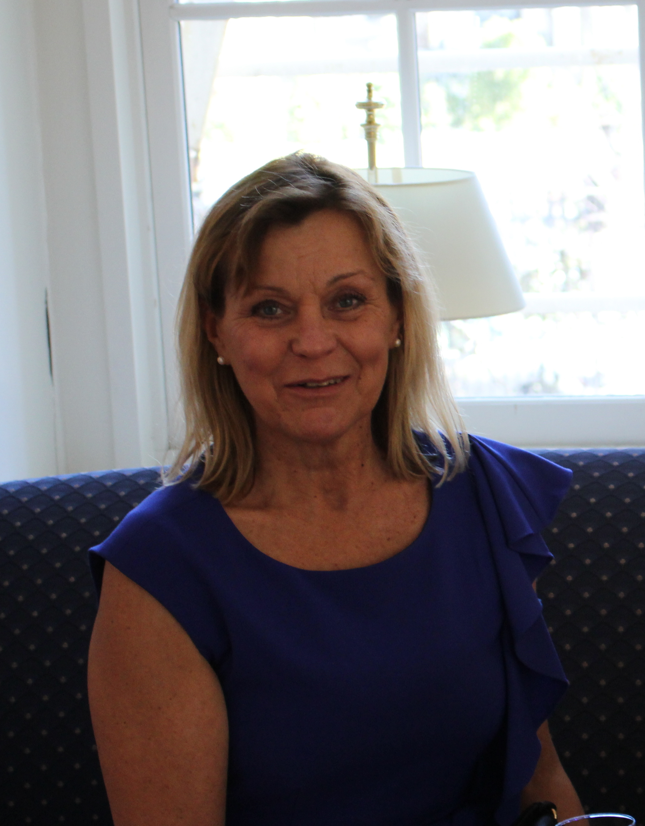 Anne Veesaar